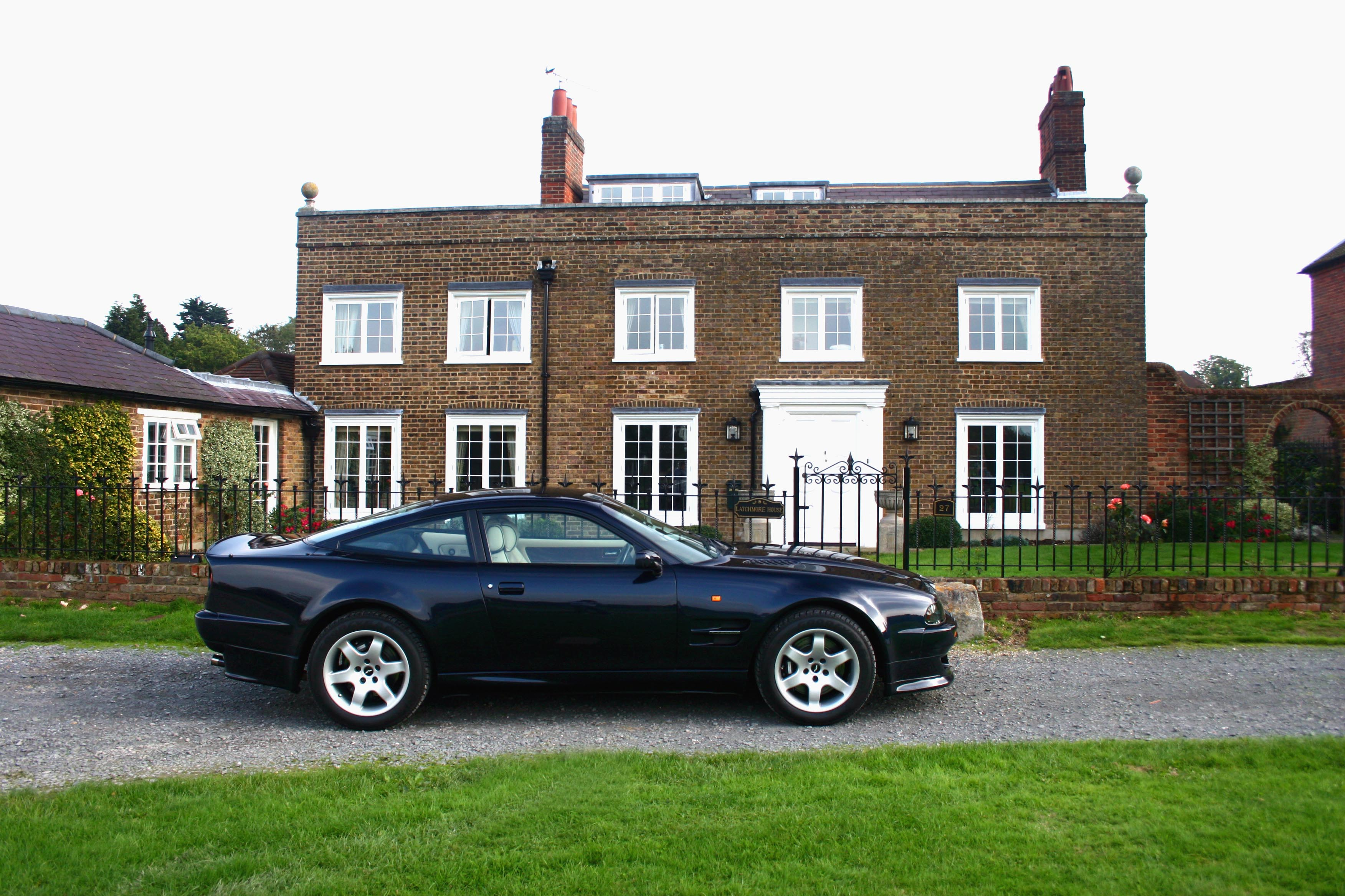 1998 Black Aston Martin Vantage coupé.